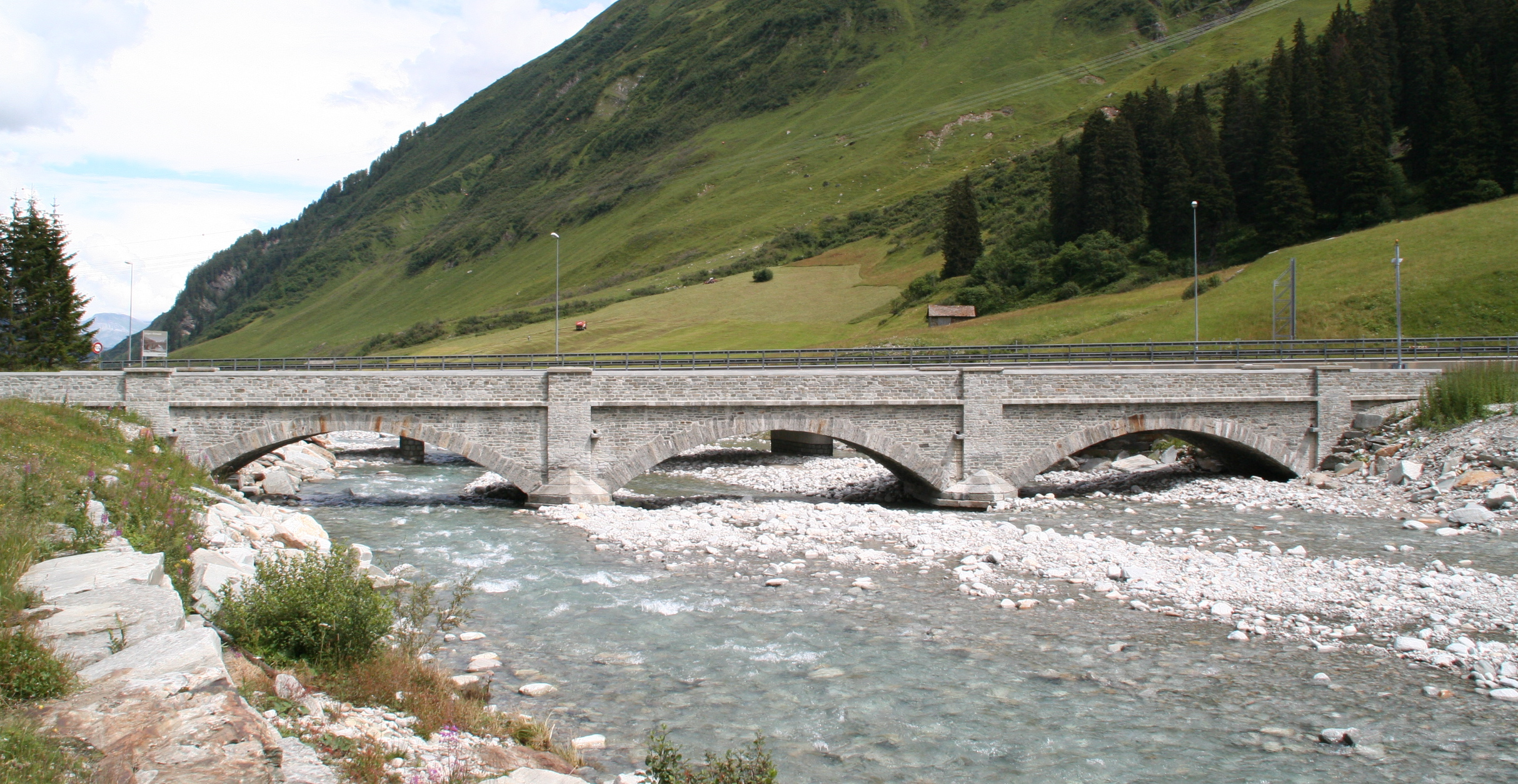 " Neue Landbrugg" am Hinterrhein GR vor dem San Bernardinotunnel